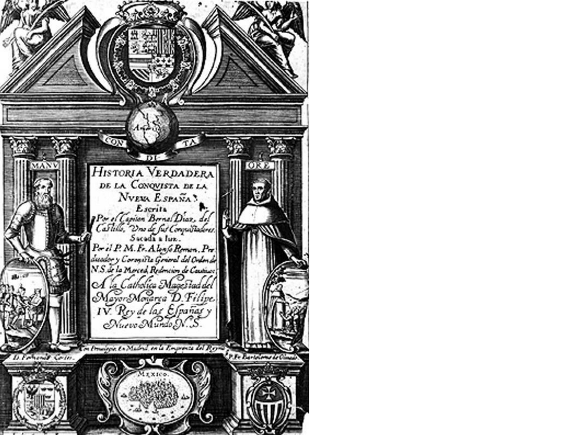 Una imagen de la Historia Verdadera de Bernal Diaz del Castillo